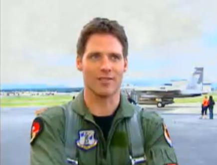 Ben Browder pendant le tournage de Stargate Continuum